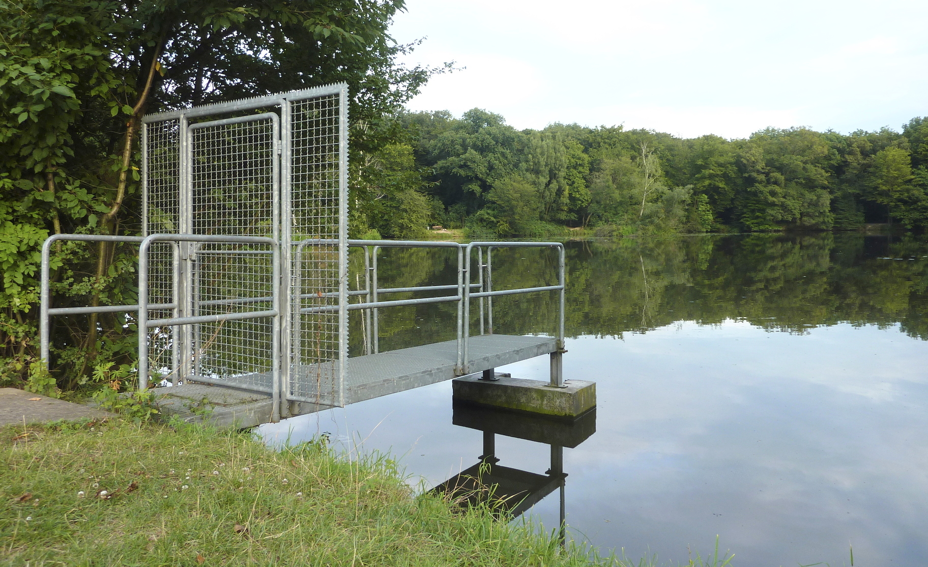 Stadt Frankfurt am Main, Stadtteil Nied: Durch den kommunalen Forst Niedwald im Nordosten des Stadtteils verlaufen an dessen nördlichem Rand zwei linke Altarme des Flusses Nidda – der Grill’sche Altarm und die Waldspitze. Beide entstanden bei der Begradigung des Flusses in den 1920er-Jahren und sind heute Biotope. Das Foto zeigt den Grill’schen Altarm, mit 29.000m² Wasserfläche der größte an der Nidda. Ansicht vom Nordufer/linken Ufer der Nidda aus, Blick nach Südosten